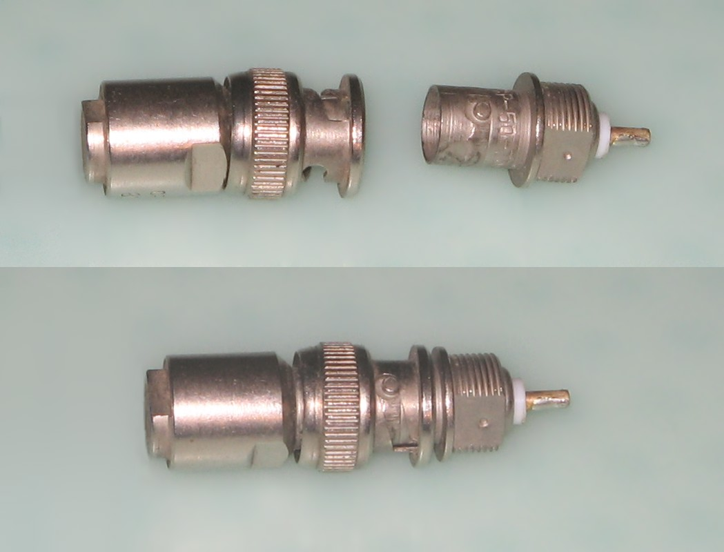 Elektraj grandfrekvencaj konektiloj kun bajoneta kunigo. Mi, auxtoro de la bildo, permesas al cxiuj uzi gxin kun cxi tiuj kondicxoj: GFDL